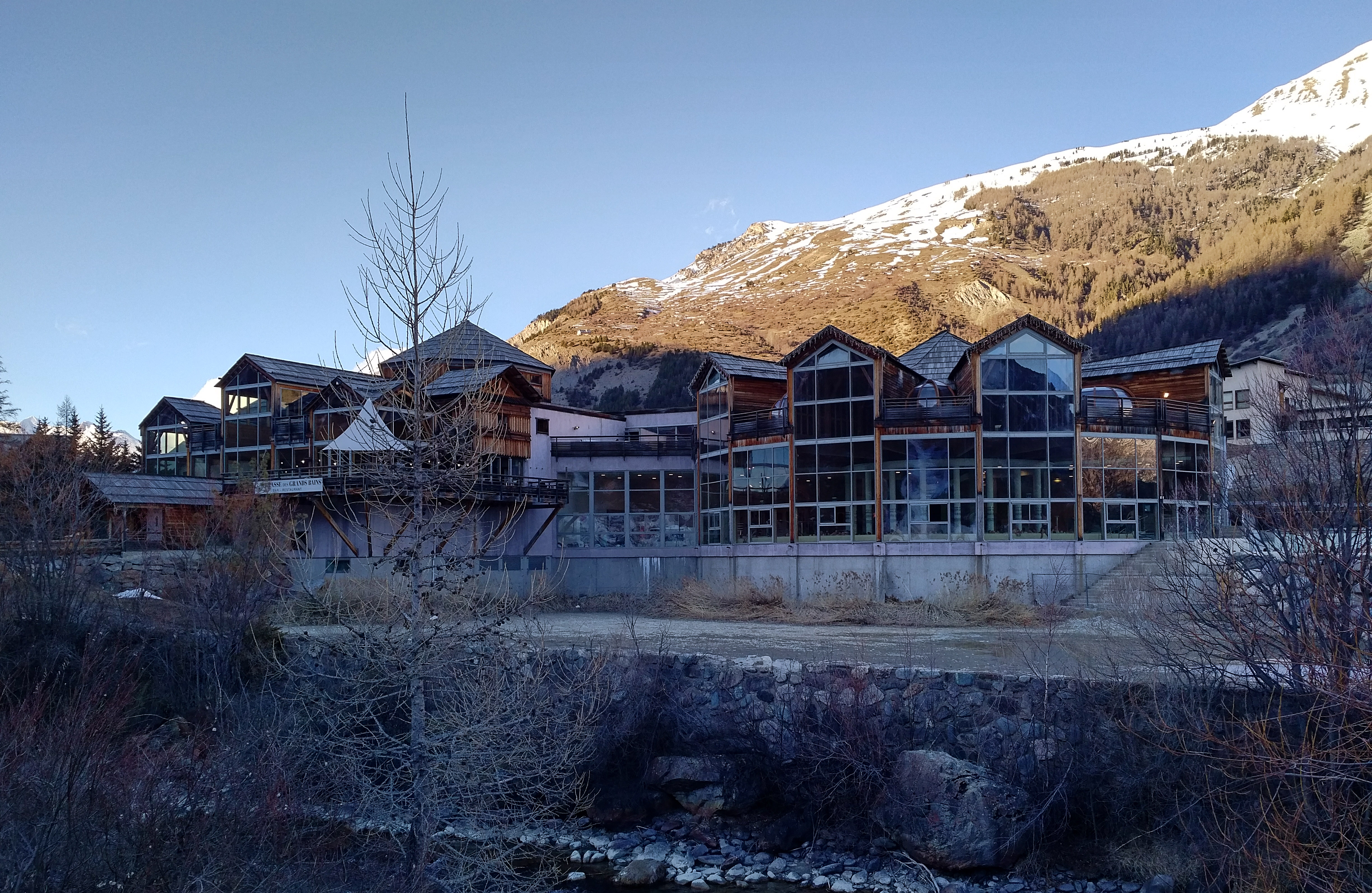 Au pied des montagnes, l'établissement Les Grands Bains dans le village Le Monêtier-les-Bains (2017).